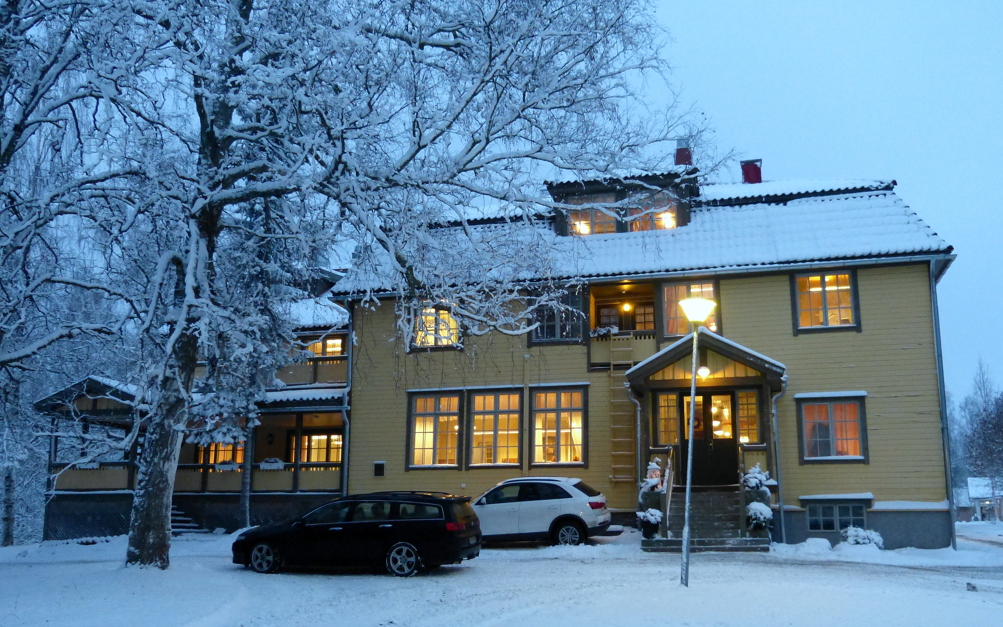 Itä-Karjalan kansanopiston vanha päärakennus (1916) 16.11.2016